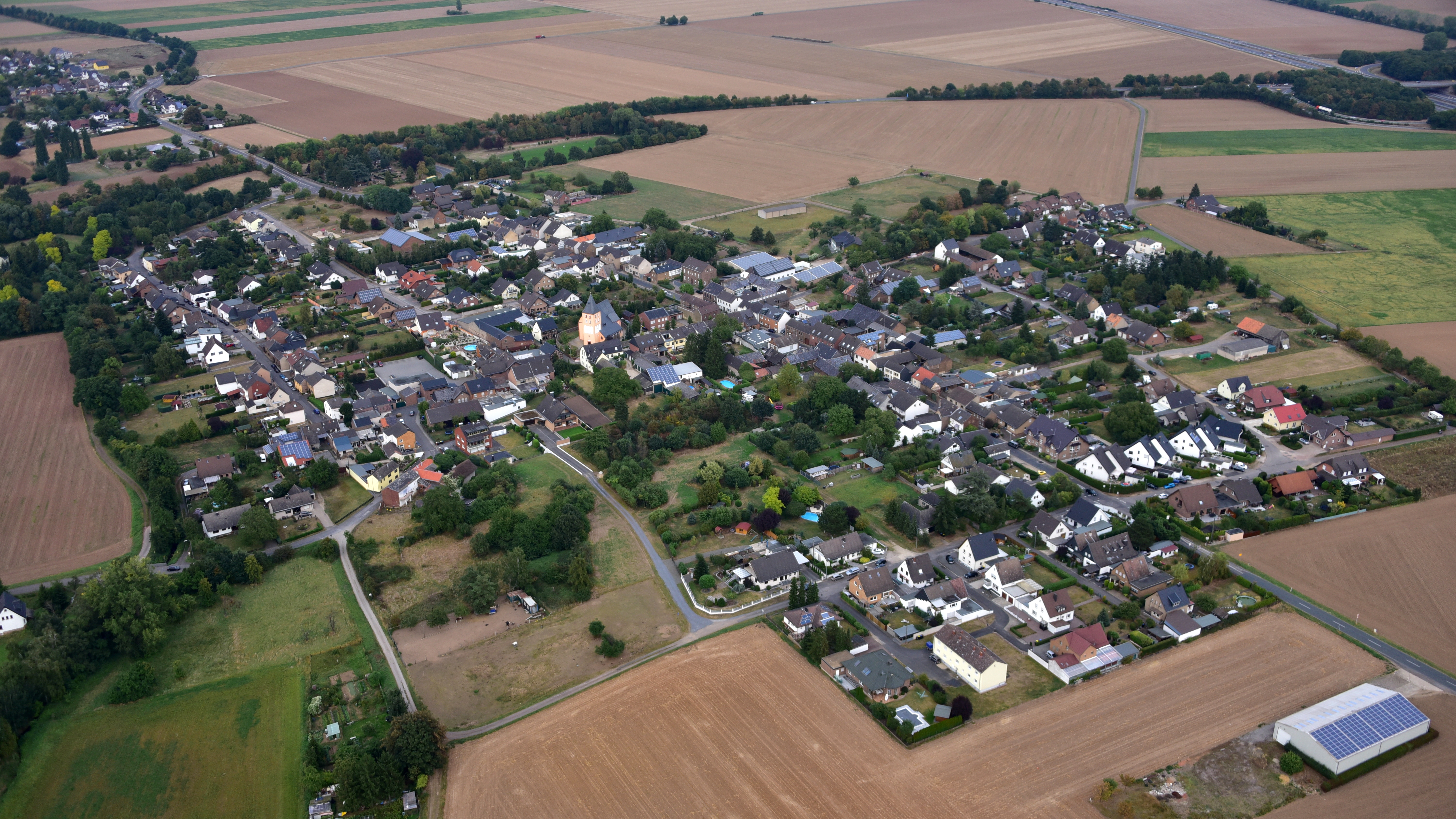 Frauenberg (Euskirchen), Luftaufnahme (2016)